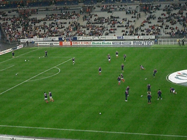 photo que j'ai prise au Stade de France, où l'on voit l'Équipe de France de football s'entrainait avant la rencontre.